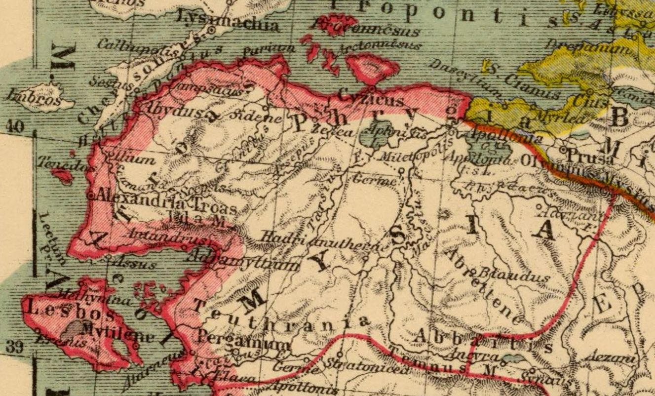 Mysia. Asia citerior. Auctore Henrico Kiepert Berolinensi. Geographische Verlagshandlung Dietrich Reimer (Ernst Vohsen) Berlin, Wilhemlstr. 29. (1903)